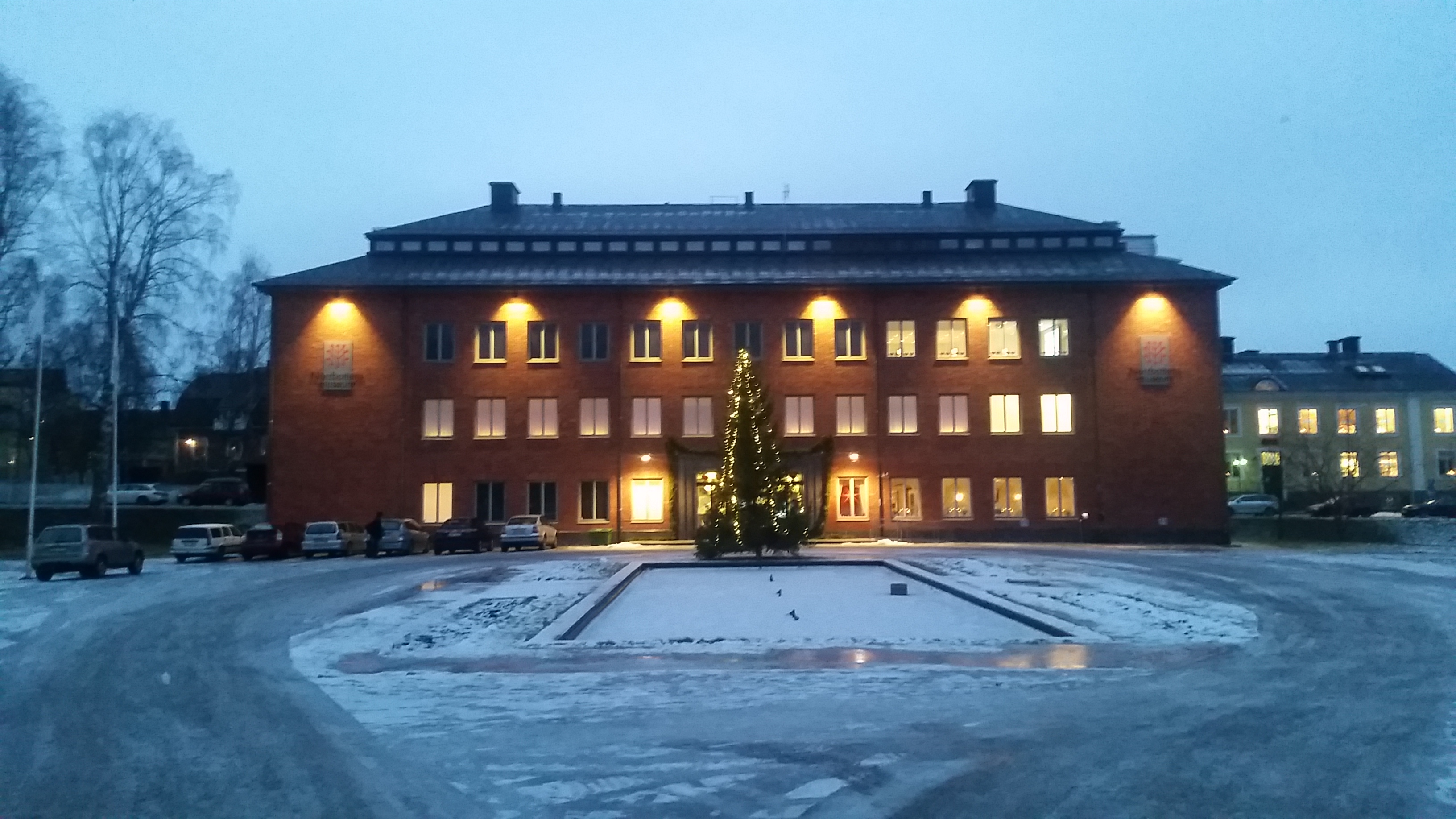 Norrbottens museum i Luleå med en julgran framför entrén.